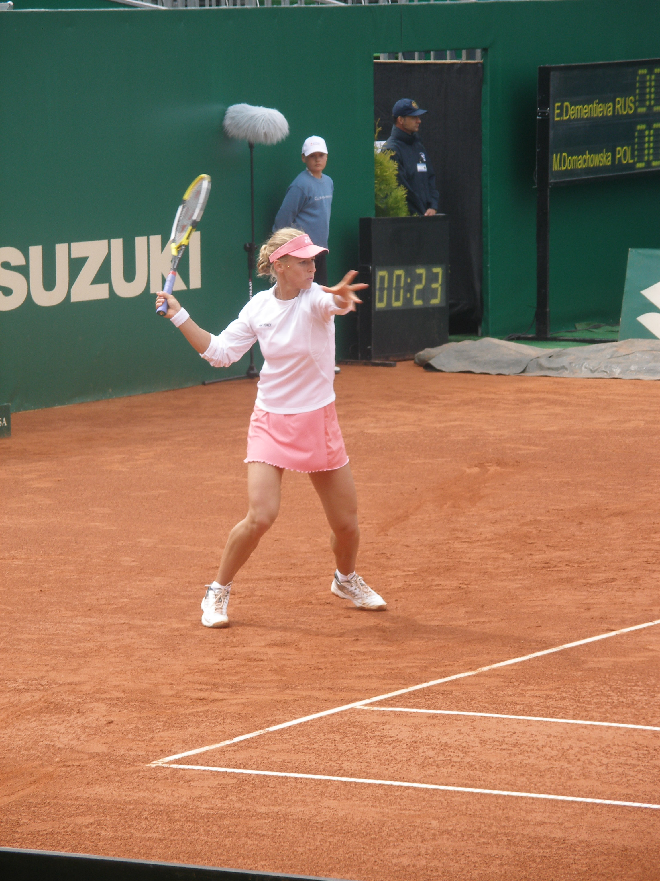 Jelena Dementiewa podczas meczu z Martą Domachowską, Suzuki Warsaw Masters 2008